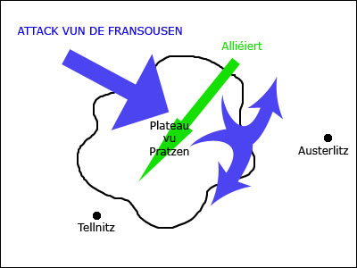 Schluecht vun Austerlitz - Strategie vum Napoléon.